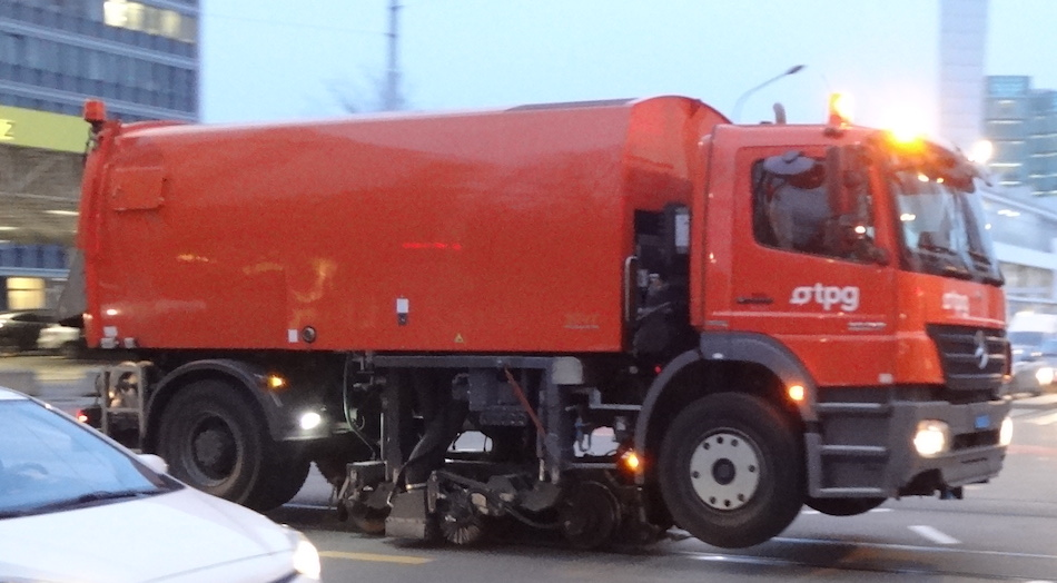 Camion muni d'essieux analogues aux tramways pour l'entretien des voies. Transports publics genevois (TPG), route des Acacias.